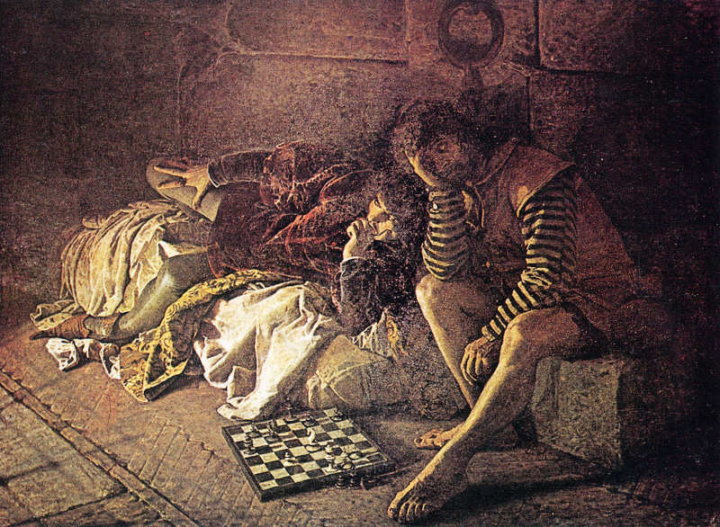 Luigi Serra: L’Annibale Bentivoglio prigioniero nel castello di Varano (history painting 1869)